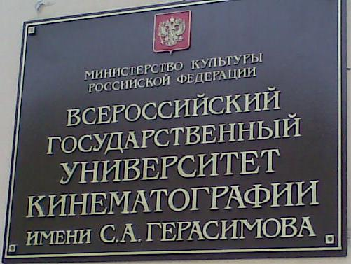 фото вывески ВГИКа